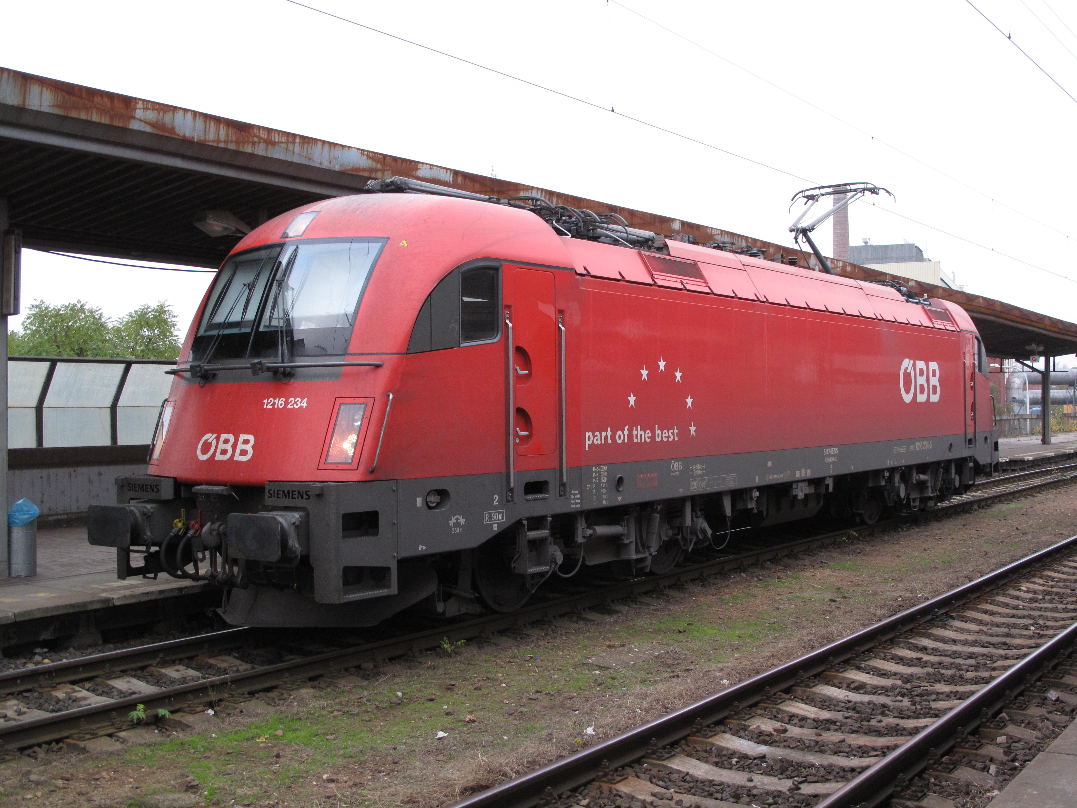 Rakouská lokomotiva v Holešovicích